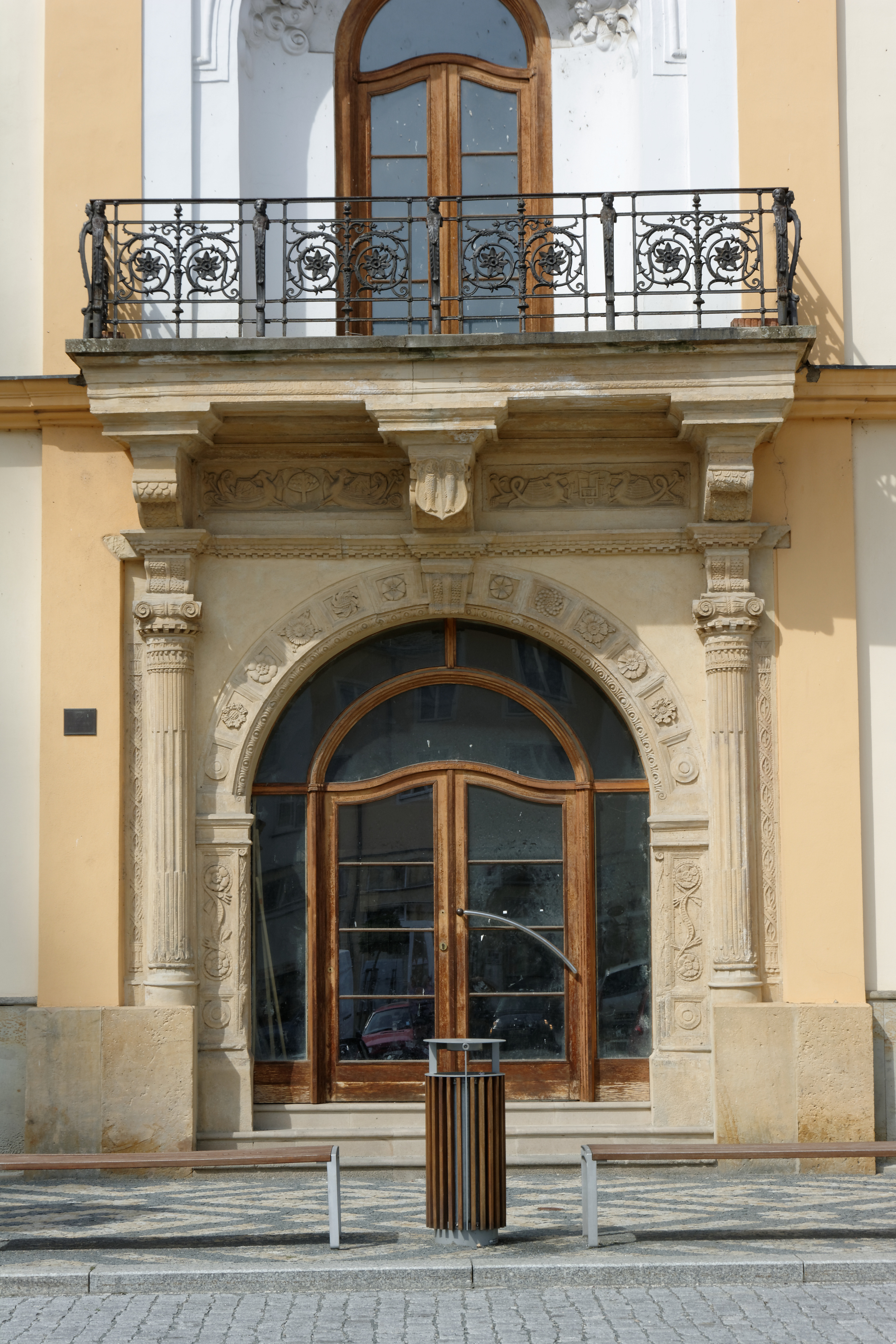 Langův dům, Litovel, Masarykova č.p. 769/2, měšťanský dům.